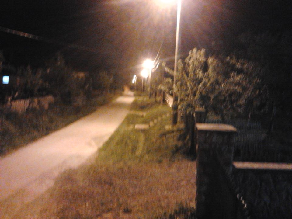 Prvobitna rasvjeta u Kopjevićima - maj 2013.